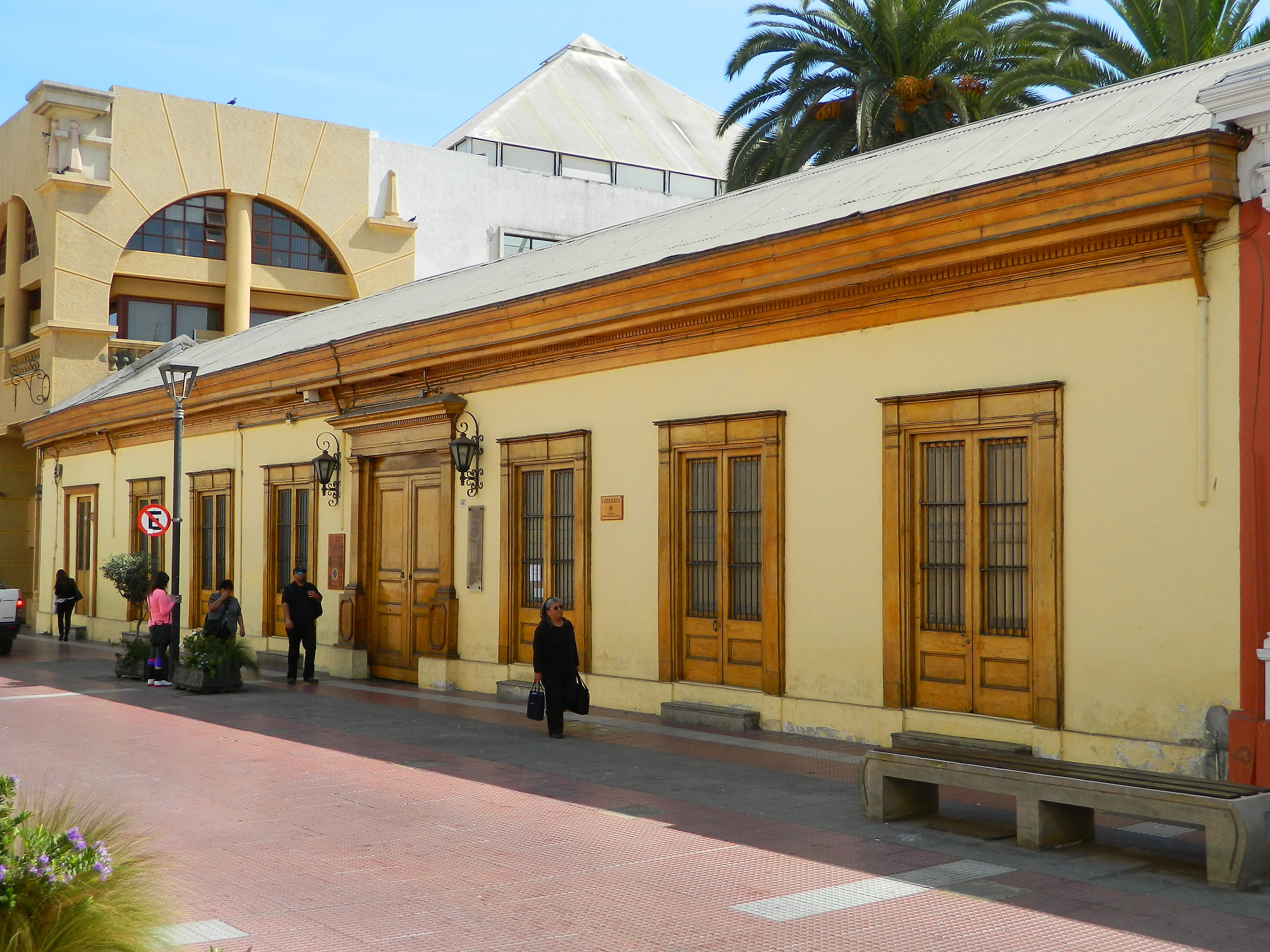 Casa Piñera This is a photo of a national monument in Chile: 1367